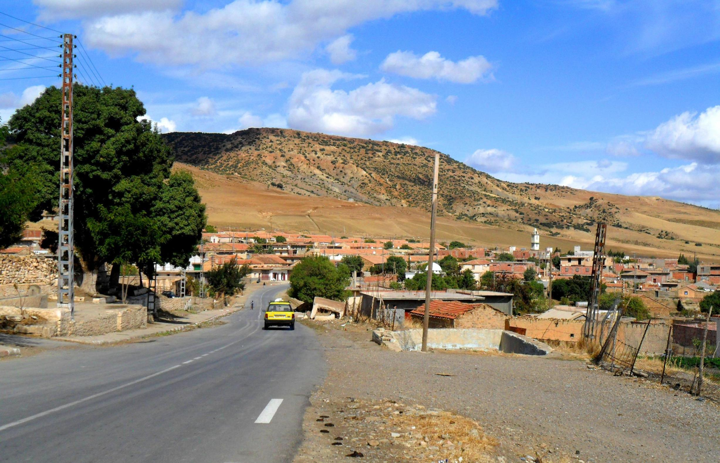 village de Kherbat Siouf dans la commune de Derrag, daira de Aziz, wilaya de Médéa, Algerie قرية خربة سيوف في بلدية دراق، دائرة عزيز، ولاية المدية، الجزائر